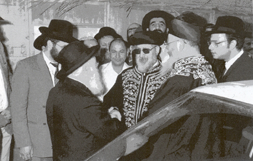 הרבנים הראשים הרב אליהו והרב שפירא ביחד עם הרב עובדיה יוסף